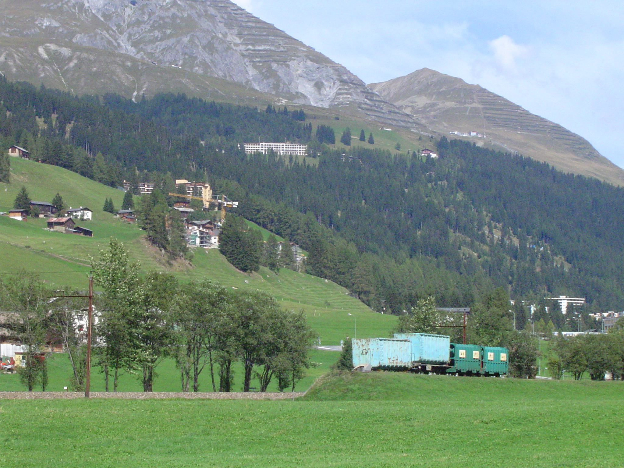 Davos, Berghotel Schatzalp gezien vanuit het dal